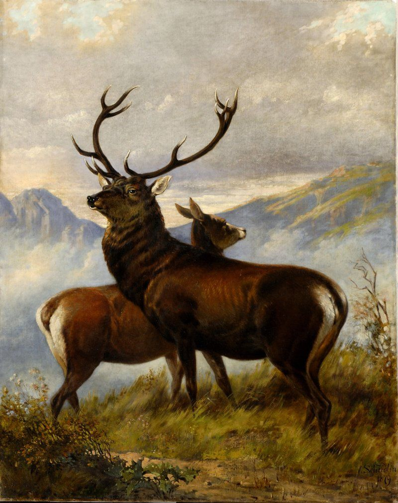 Jeleň s laňou